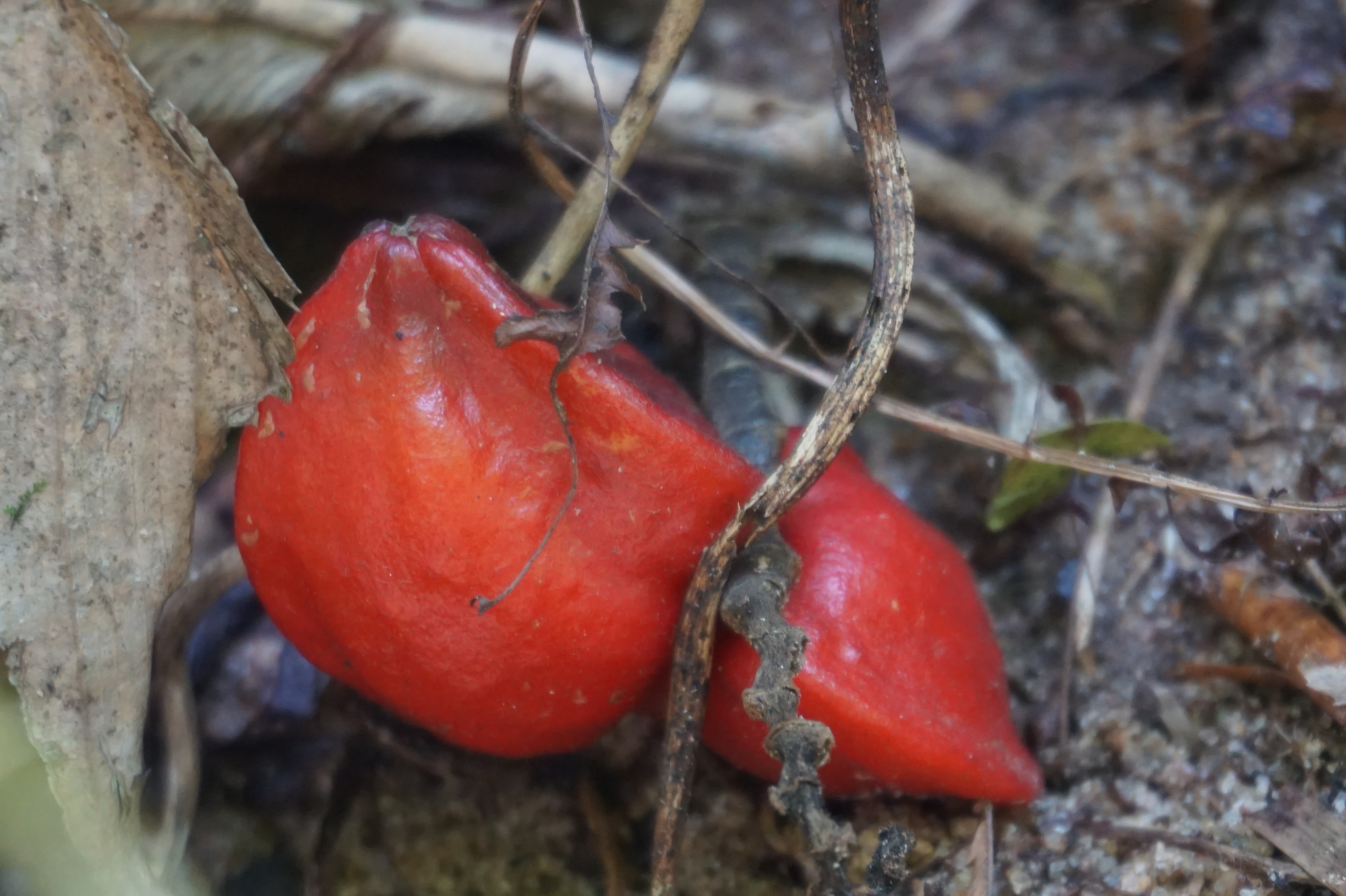 Communément appelé "feuille d'attiéké" en Côte d'Ivoire